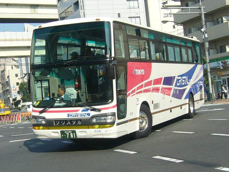 登録番号 足立200か・781 クリスタル観光バス足立営業所所属 車番834 2006年8月5日 木場五丁目交差点にて撮影